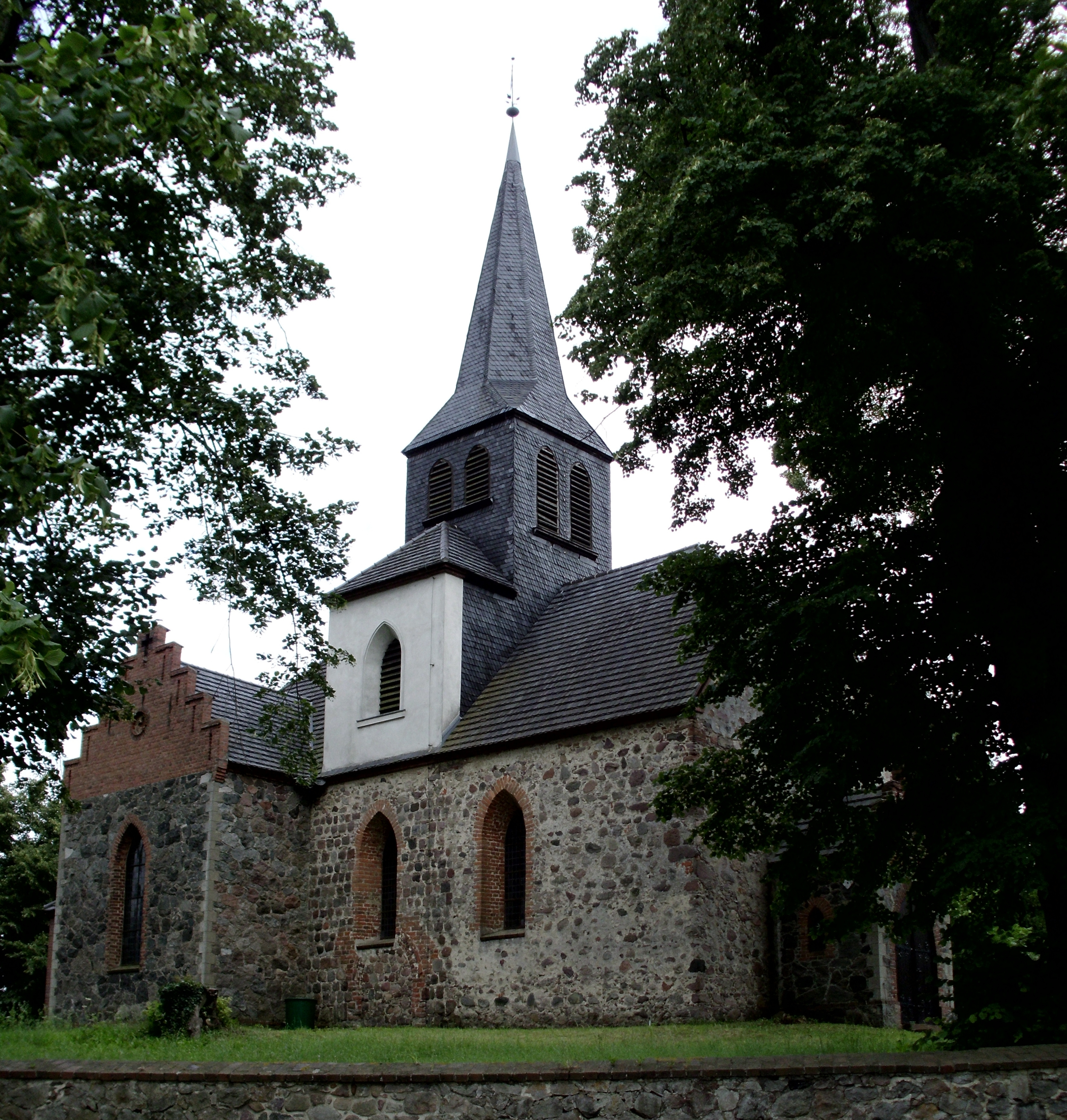 Dorfkirche Sauen, Gemeinde Rietz-Neuendorf, Brandenburg, Germany